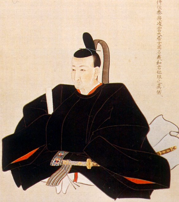 佐竹義和 Satake Yoshimasa.